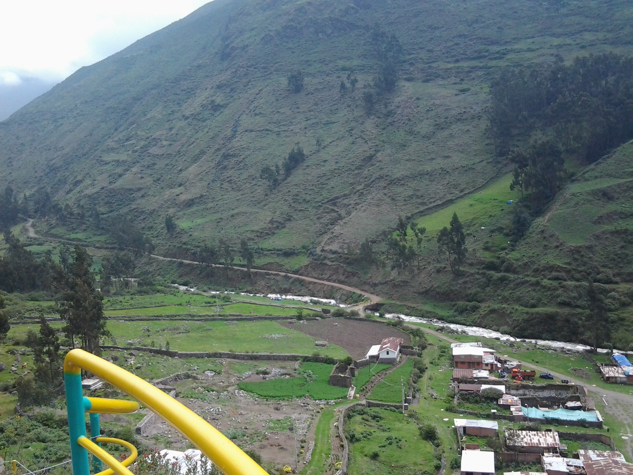 Mirador del Pueblo Fantasma - Obrajillo - Canta